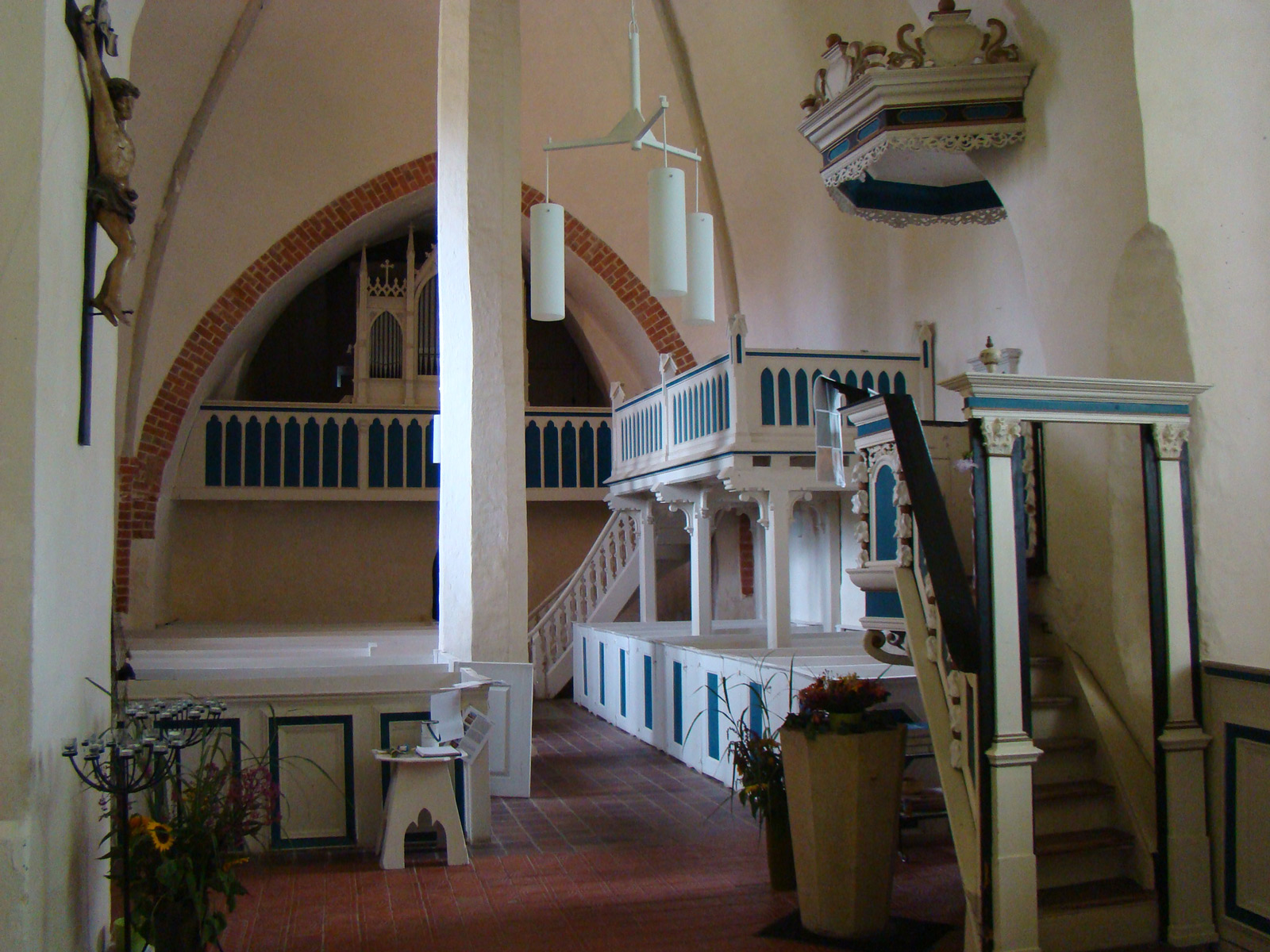 Kirche in Schloen. Foto: Peter Schmelzle, 2011.